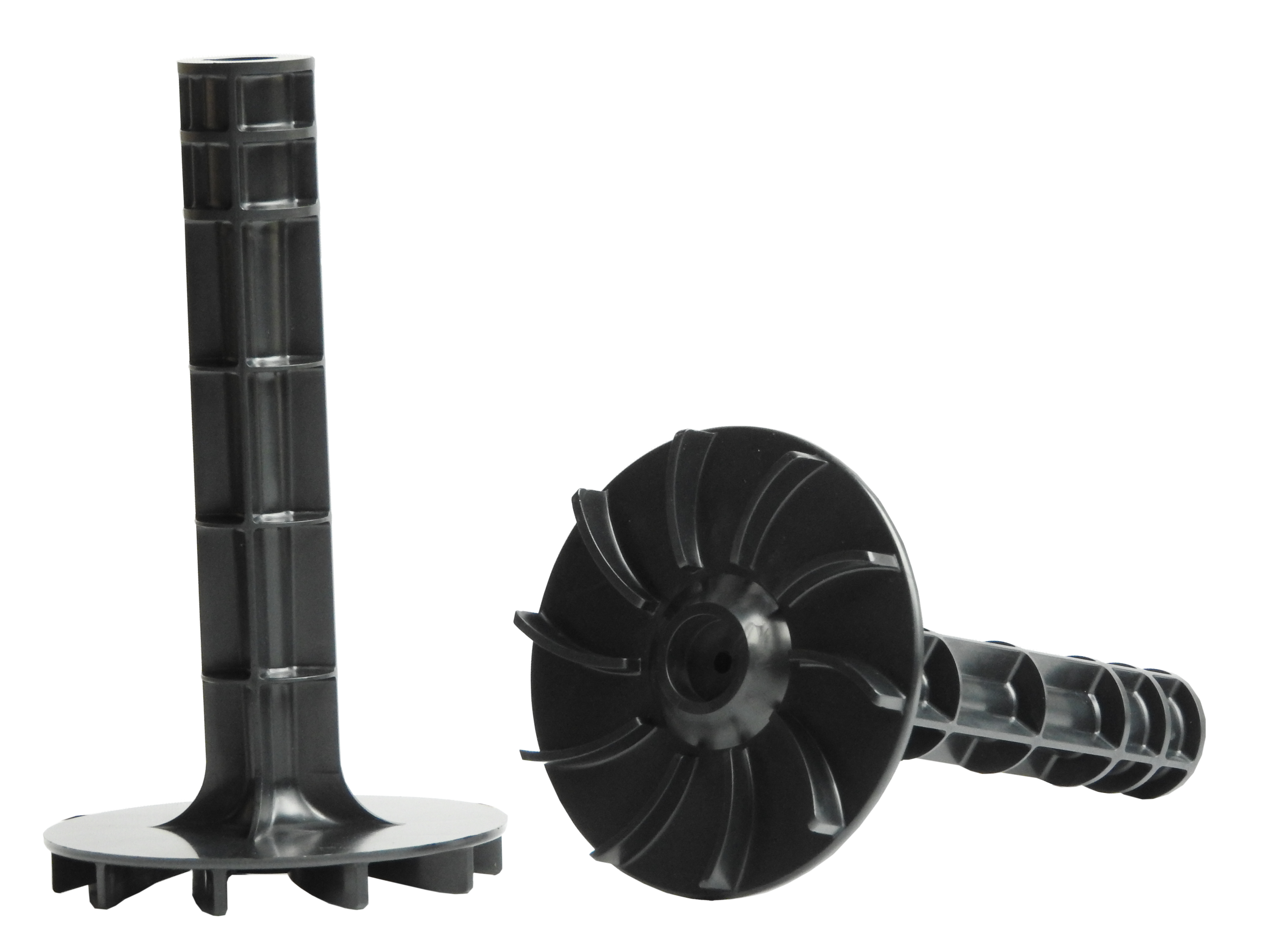 Photo d'une turbine d'oxygénation adaptable sur tout types de moteur pour micro station d'épuration.